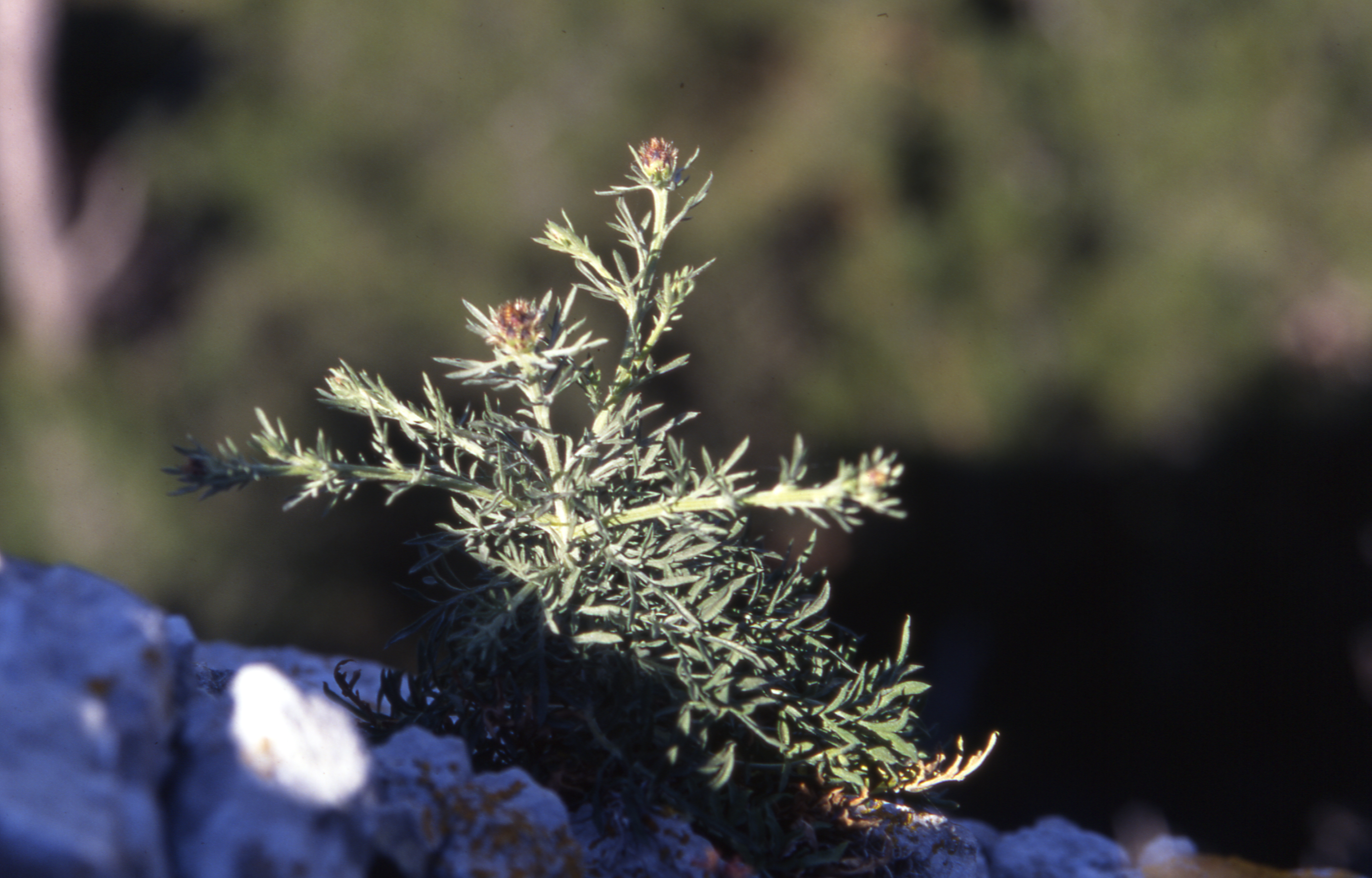 Centaurea corymbosa